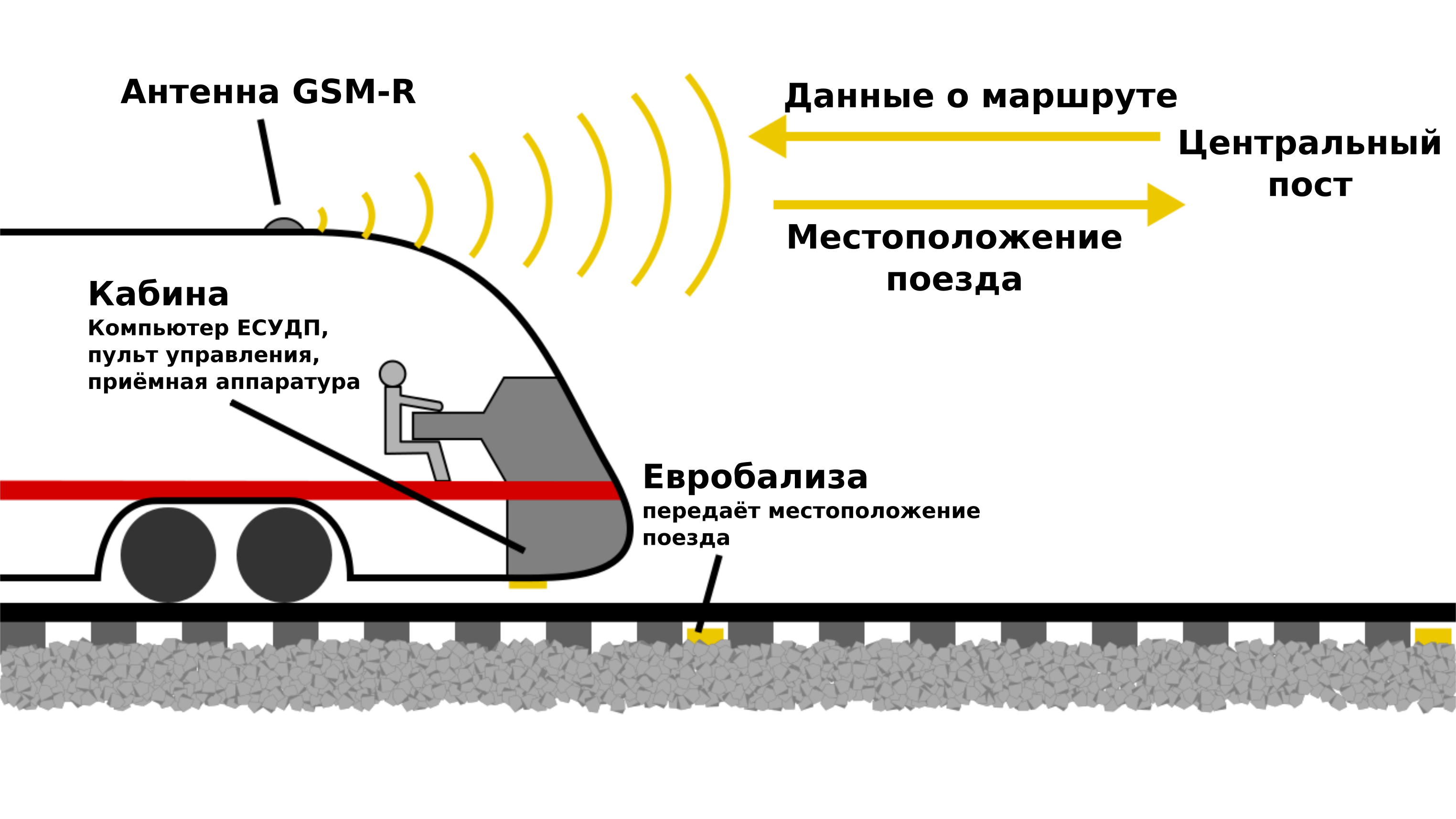 Схема работы Европейской системы управления движением поездов третьего уровня